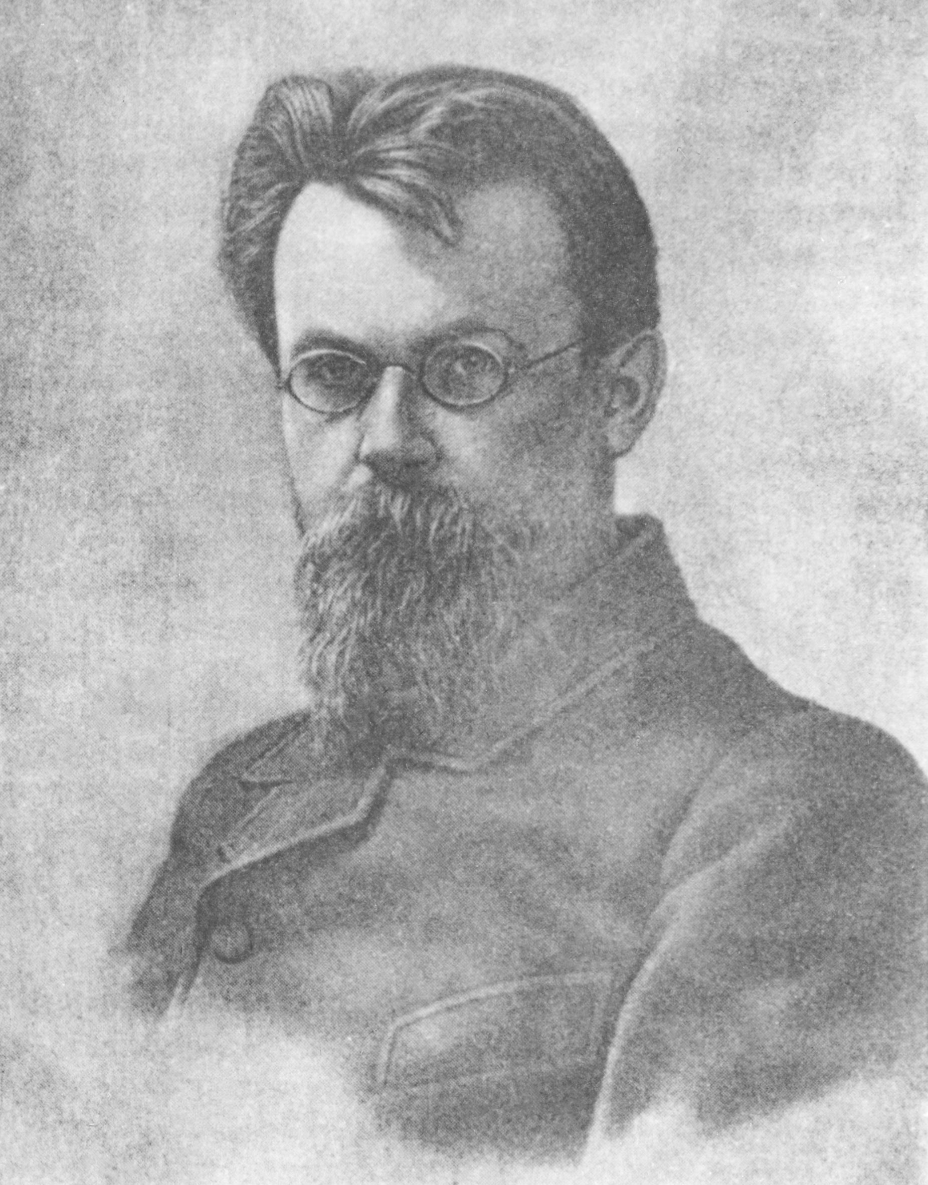 Владимир Иванович Вернадский — естествоиспытатель, геолог, Академик Санкт-Петербургской академии наук.